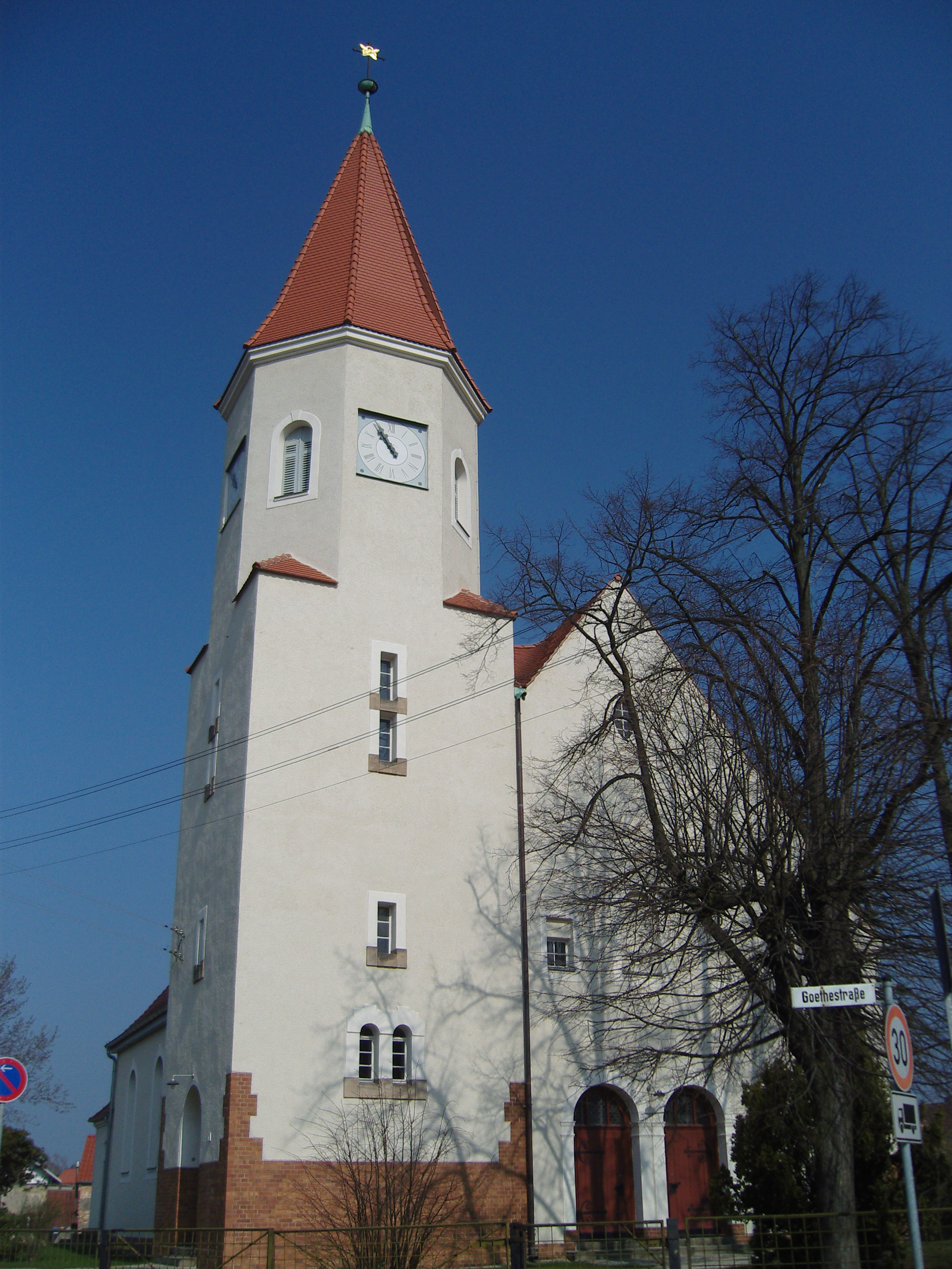 Kirche im Senftenberger Ortsteil Hosena